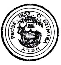 Печать села Симер Перечинского района (Закарпатье)